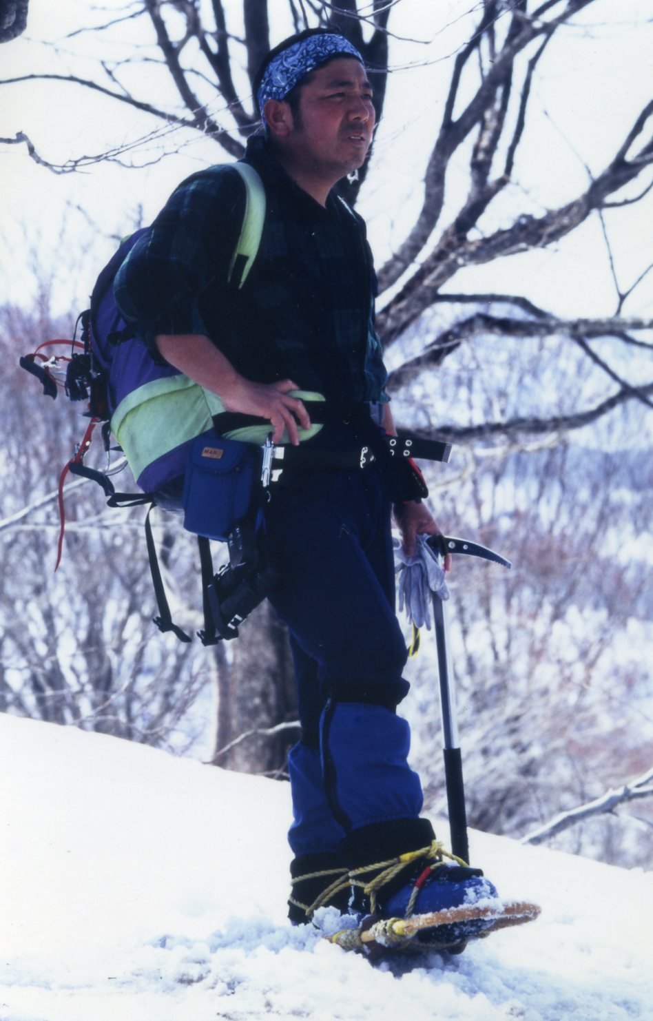 八木沢マタギ 写真：佐藤良美本人